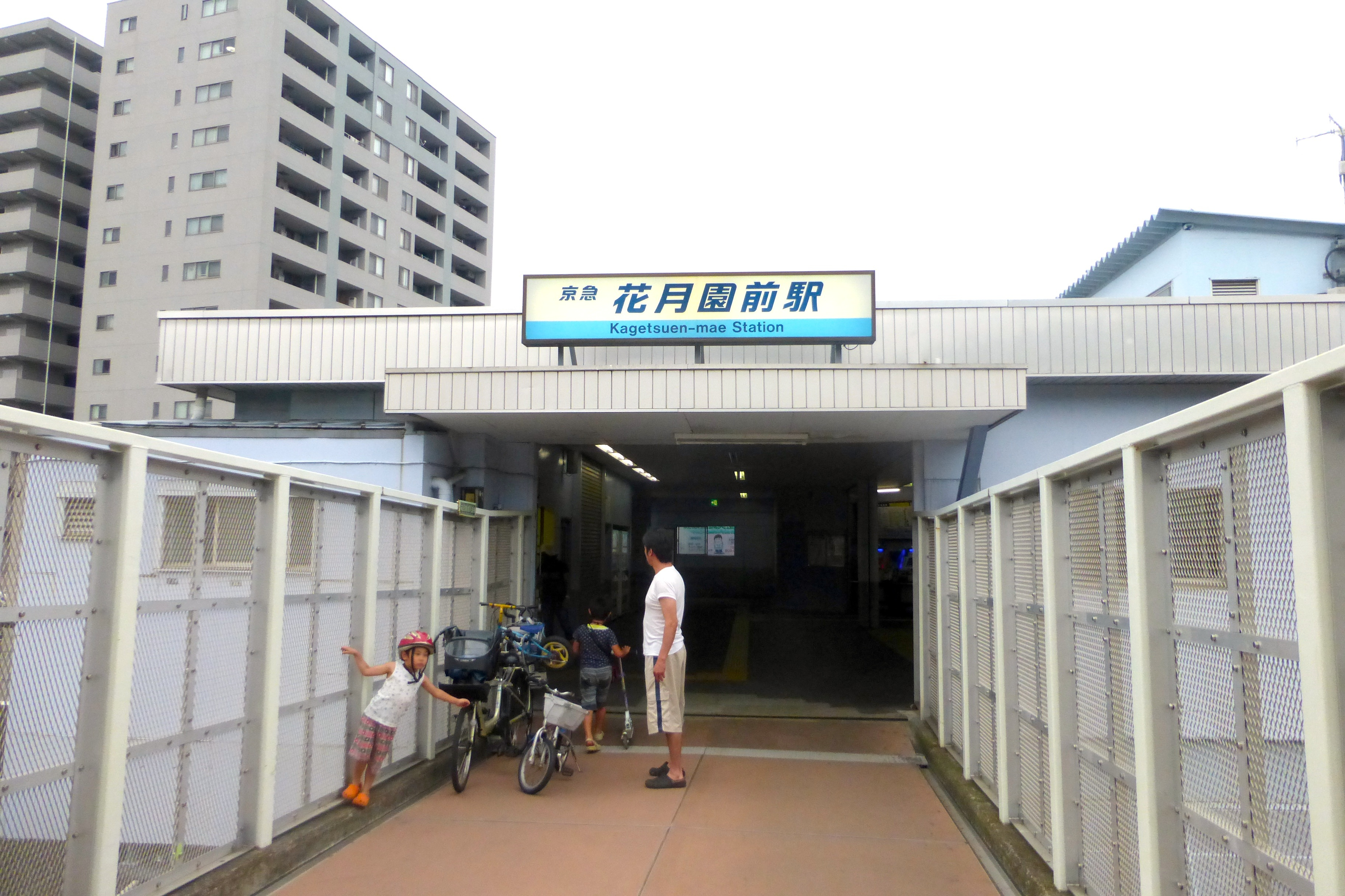 花月園前駅の出入り口 (Kagestuen-mae Station exit)